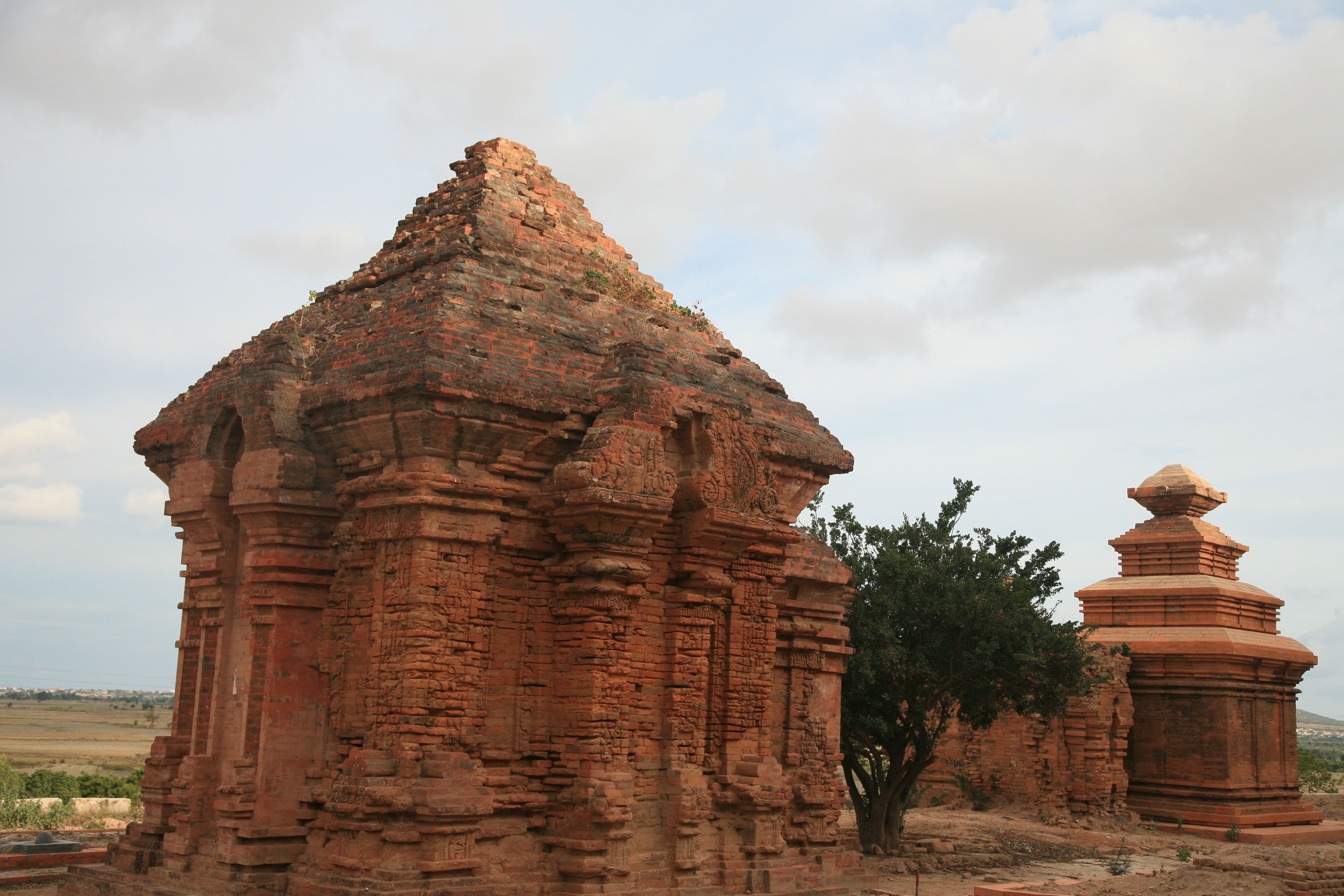 Toàn cảnh quần thể di tích tháp Po Dam, Bình Thuận.